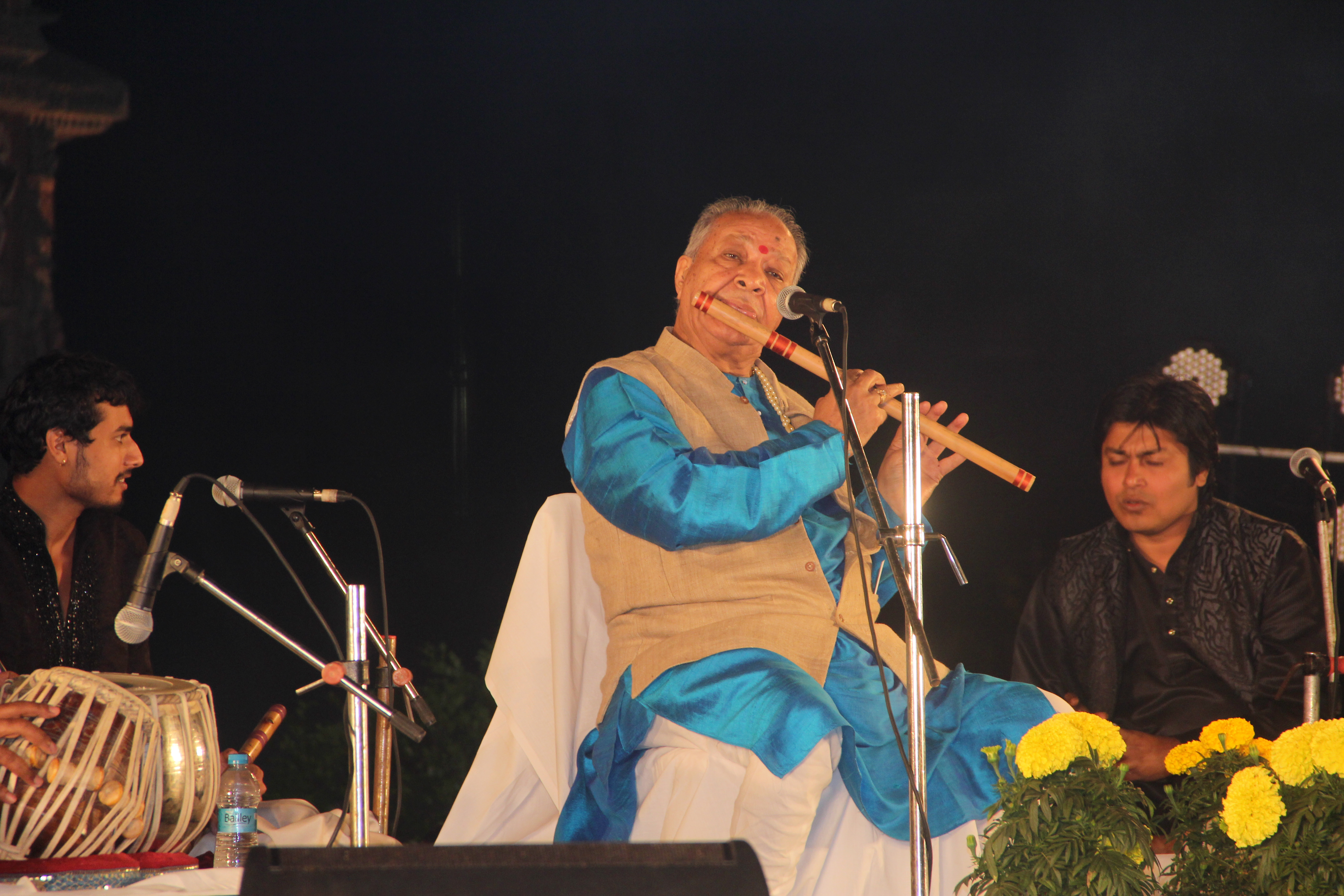 ଓଡ଼ିଆ: Pt. Hariprasad Chaurasia Performing at Rajarani Music Festival, Rajarani Temple, Bhubaneswar, Odisha